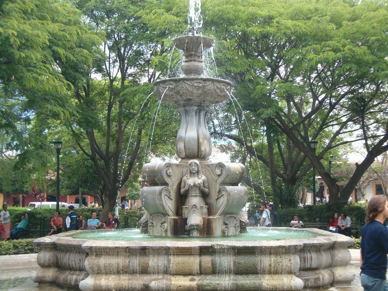 אנטיגואה גואטמלה.